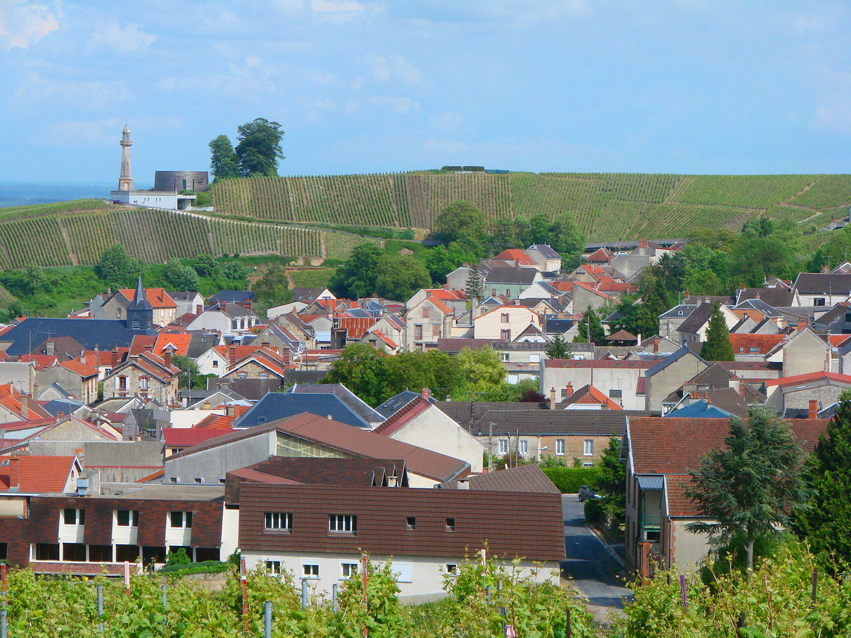 Verzenay, village de la Montagne de Reims,Marne(51),France.